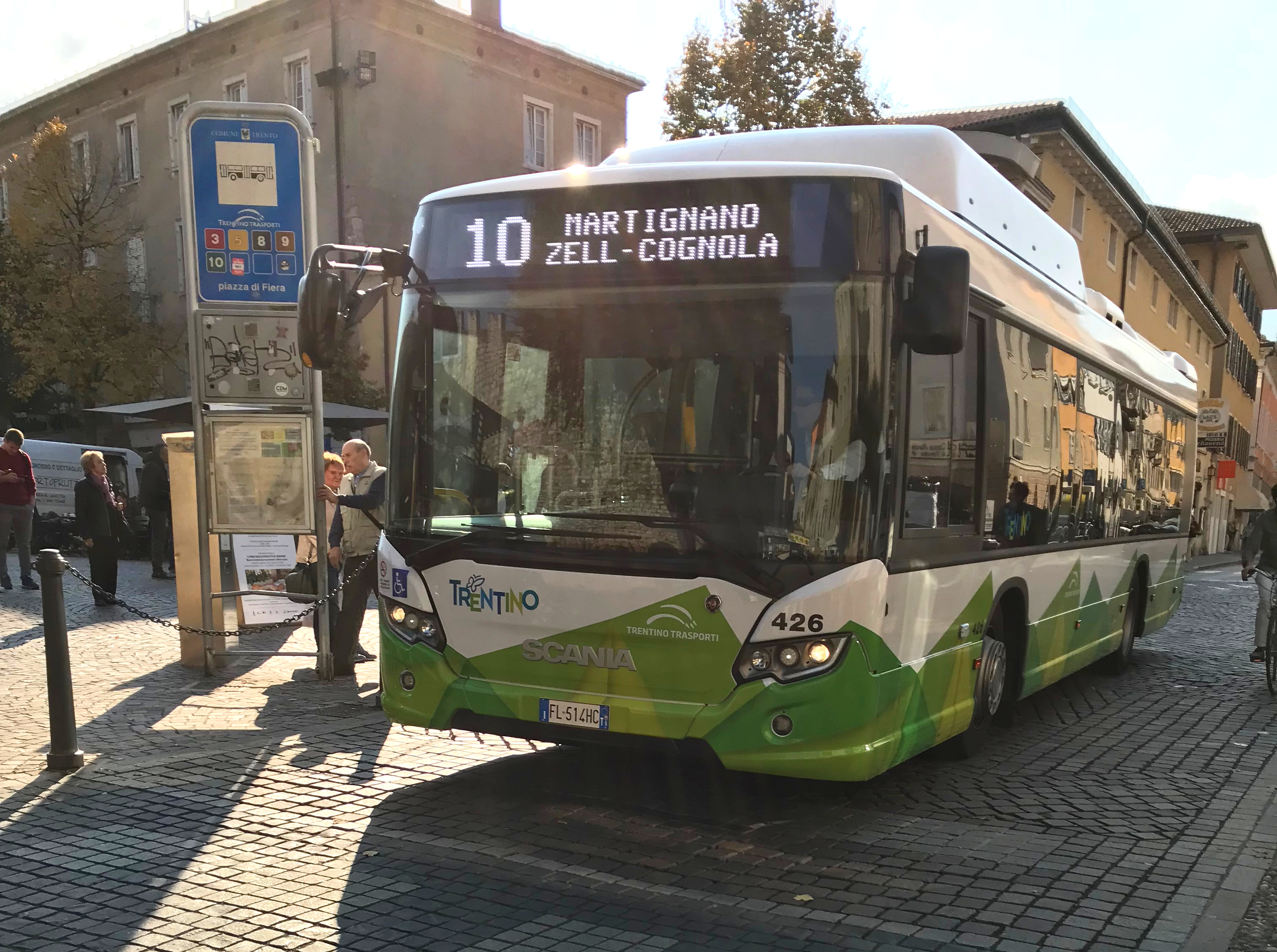 Scania Citywide matr.426 di Trentino Trasporti (Trento) in servizio urbano sulla linea 10 in Piazza Fiera.